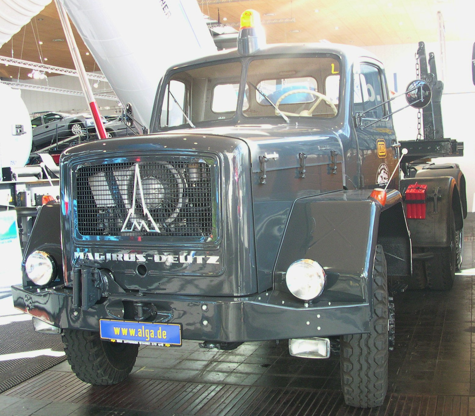 Nutzfahrzeug-IAA, Hannover 2004, Magirus Eckhauber, Sattelzugmaschine mit Rungen (dahinter dreiachsiger Nachläufer, der hier kaum zu erkennen ist)